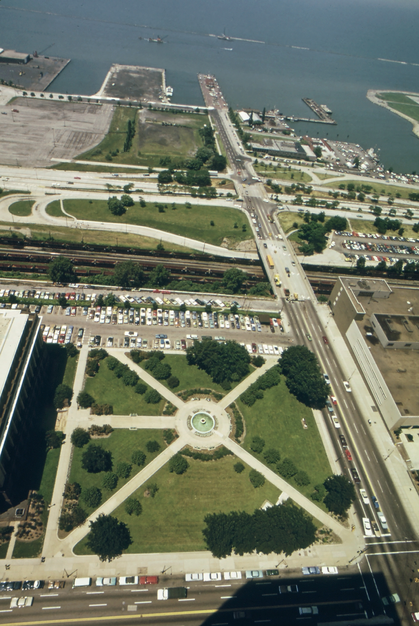 Willard Park in Cleveland, Ohio